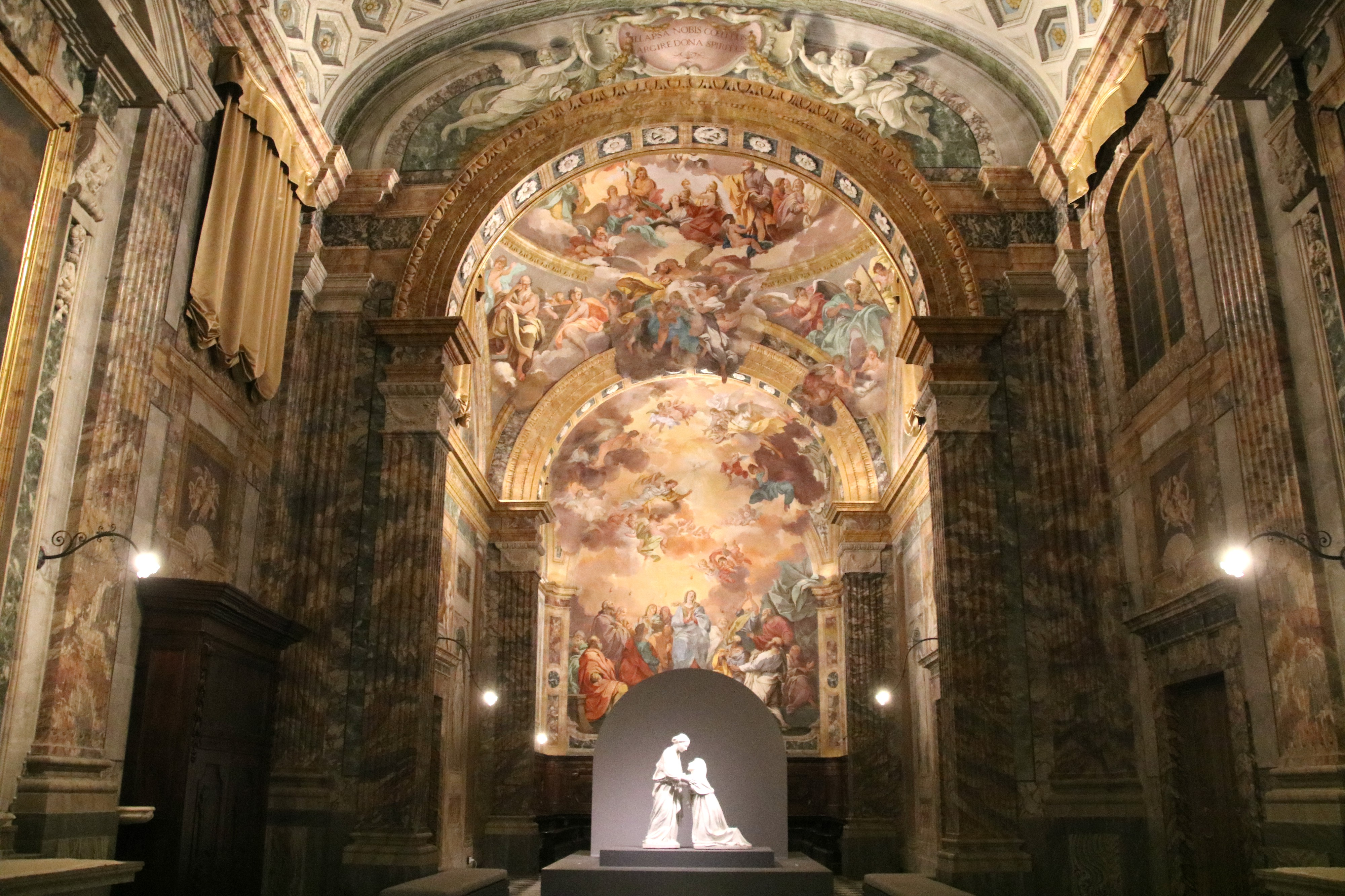 Interno della chiesa di San Leone, Pistoia